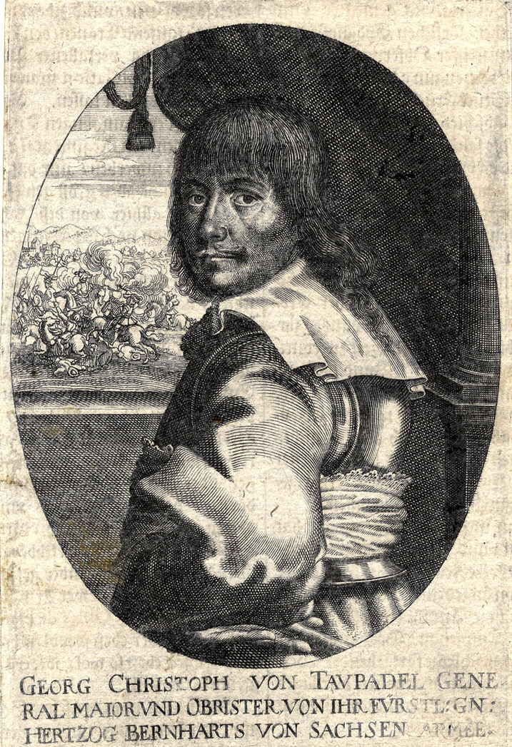 Georg Christoph von Taupadel, Generalmajor und Obrister von … Hertzog Bernharts von Sachsen Armee, Kupferstich; um 1632